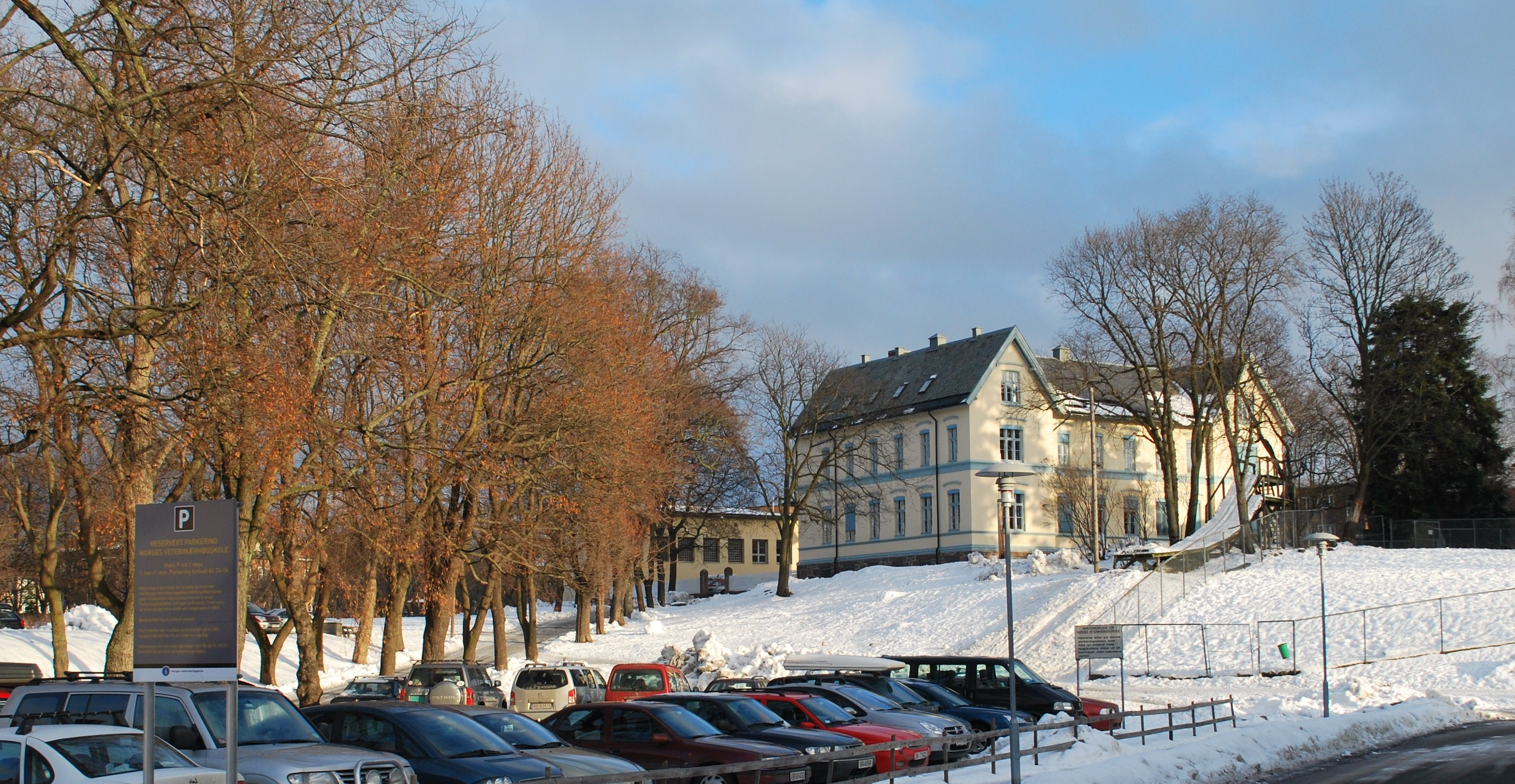 Thulstrups gate 3, Lindern, Oslo. Diakonhjemmet sykehus frem til 1890-1900, tvangsskole for gutter (Gjetemyren skole, senere Lindern skole) fra 1904 til 1990. I dag lokaler for Norges veterinærhøgskole.